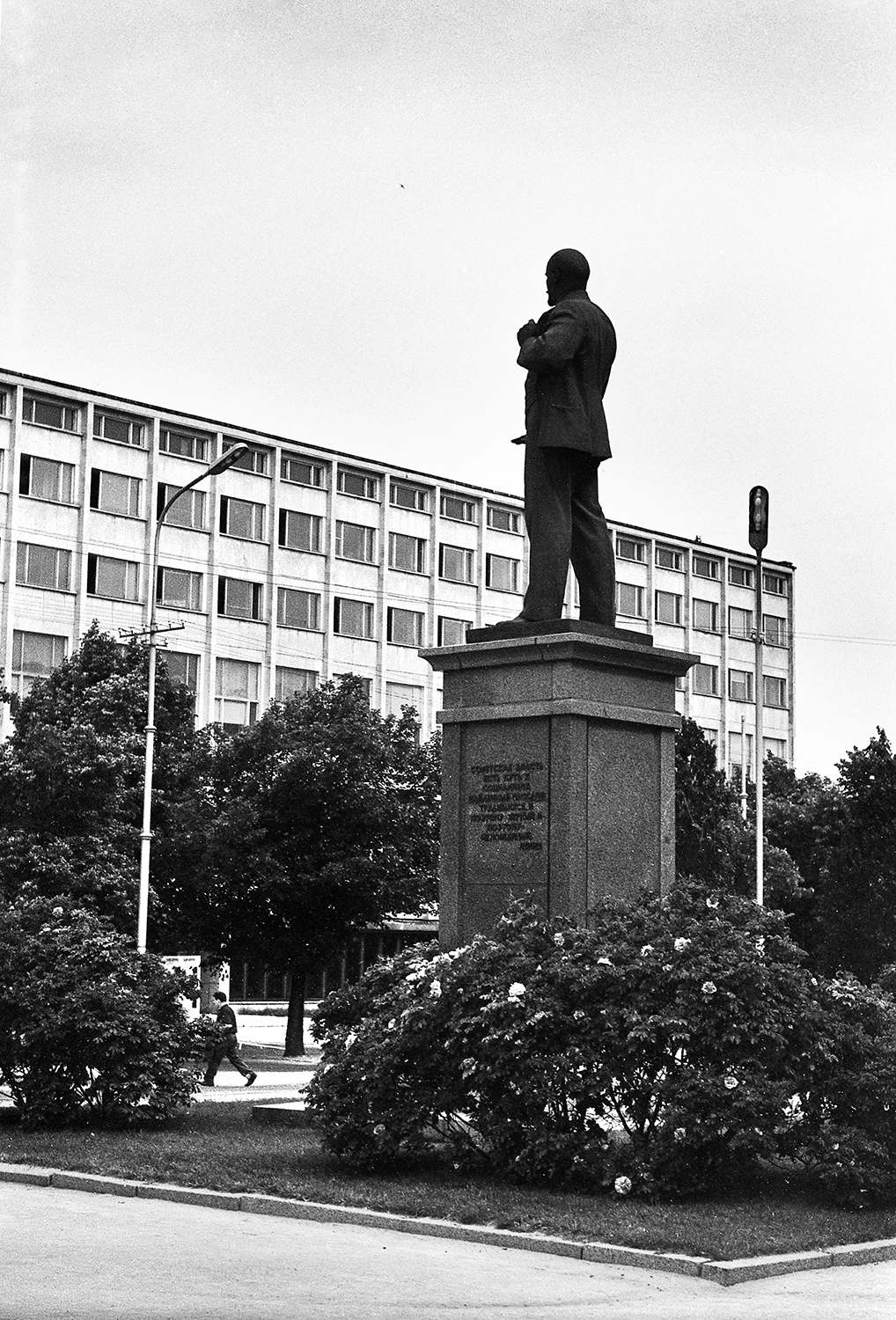 Lenini ausammas Välisministeeriumi hoone ees 72